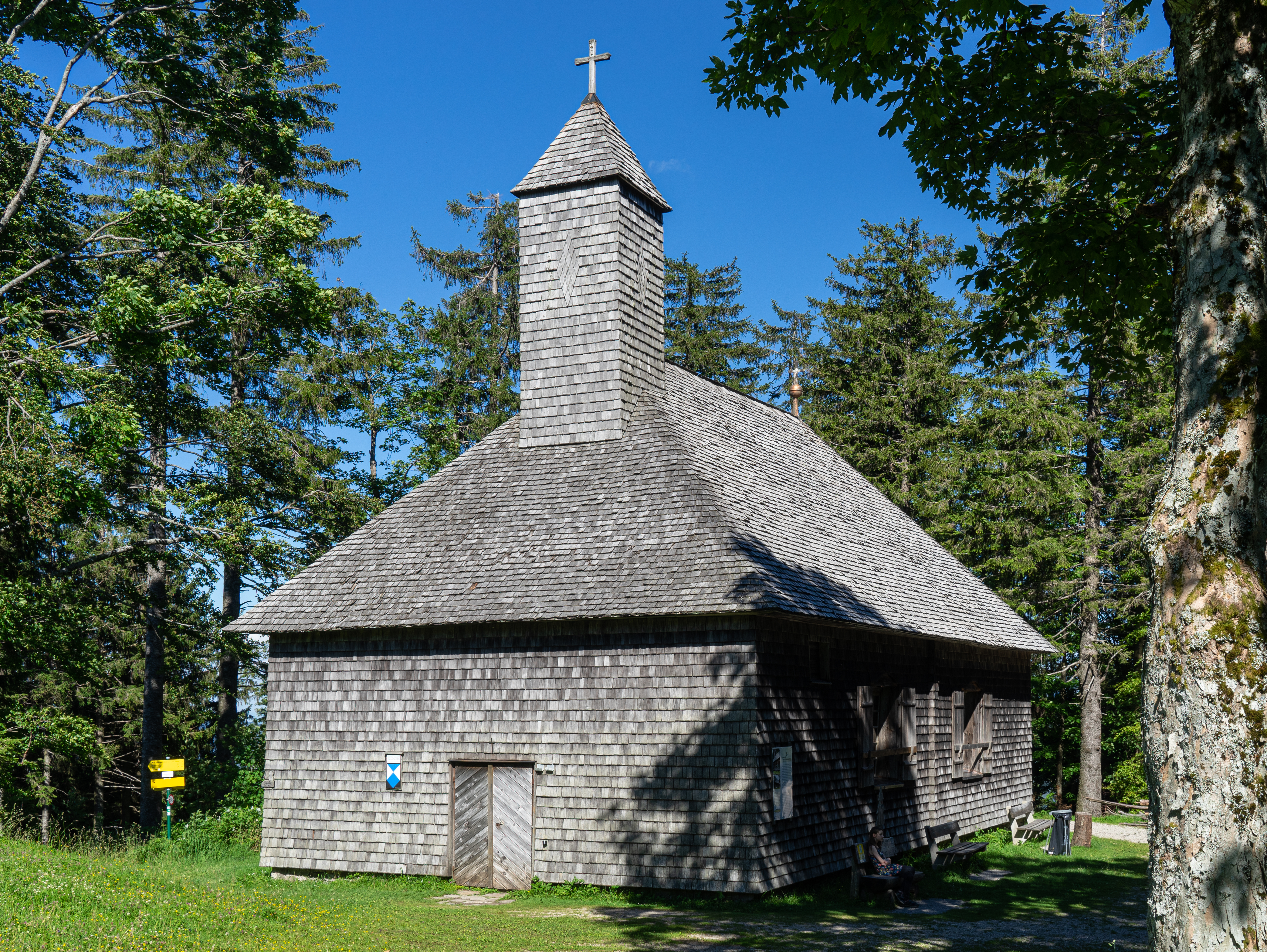 Kirche St. Koloman, Kolomansberg, Oberösterreich Westseite